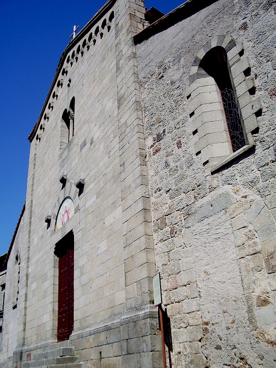 Chiesa di San Niccolò Arcidosso (GR), foto 13/07/2007